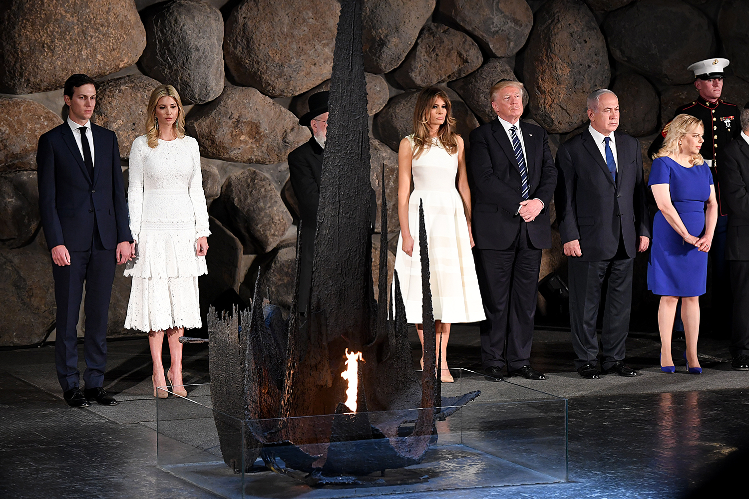 DSC_4027F